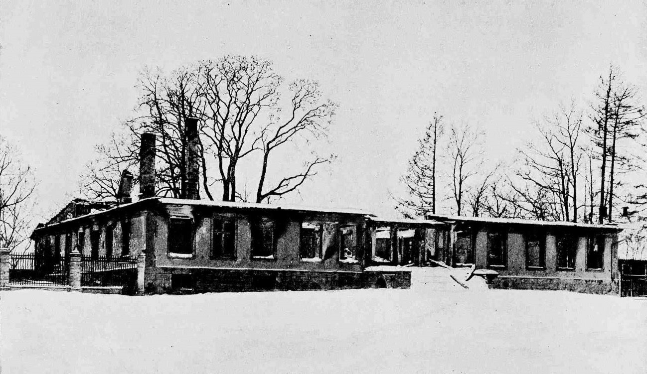 Drabeši mõisa peahoone pärast 1905. aasta põlengut.